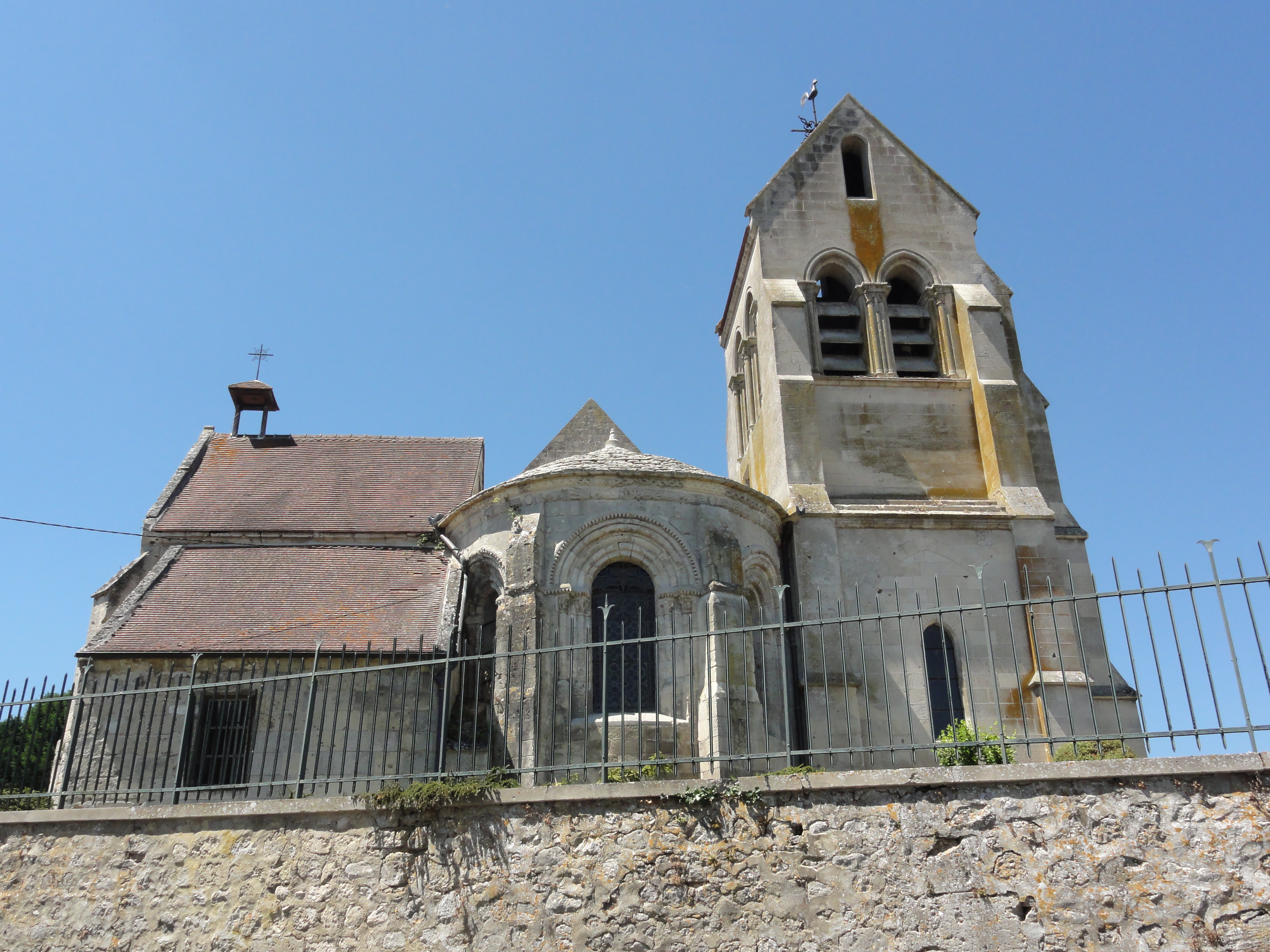 Viel-Arcy (Aisne) église